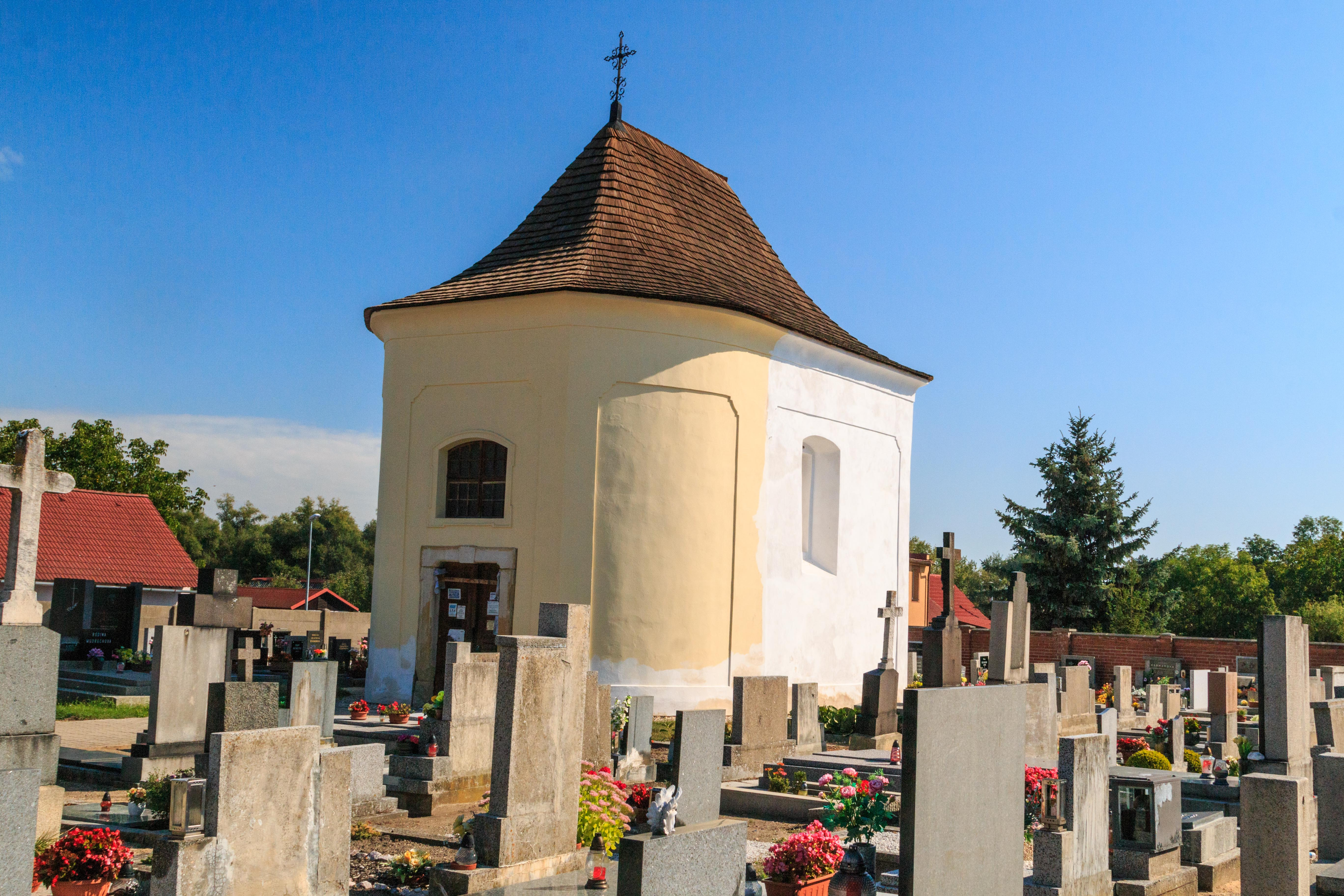 Hřbitovní kaple svatého Jiljí, střed vsi, východní část hřbitova, Rejšice.